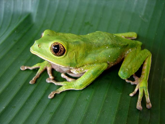 Phyllomedusa venusta